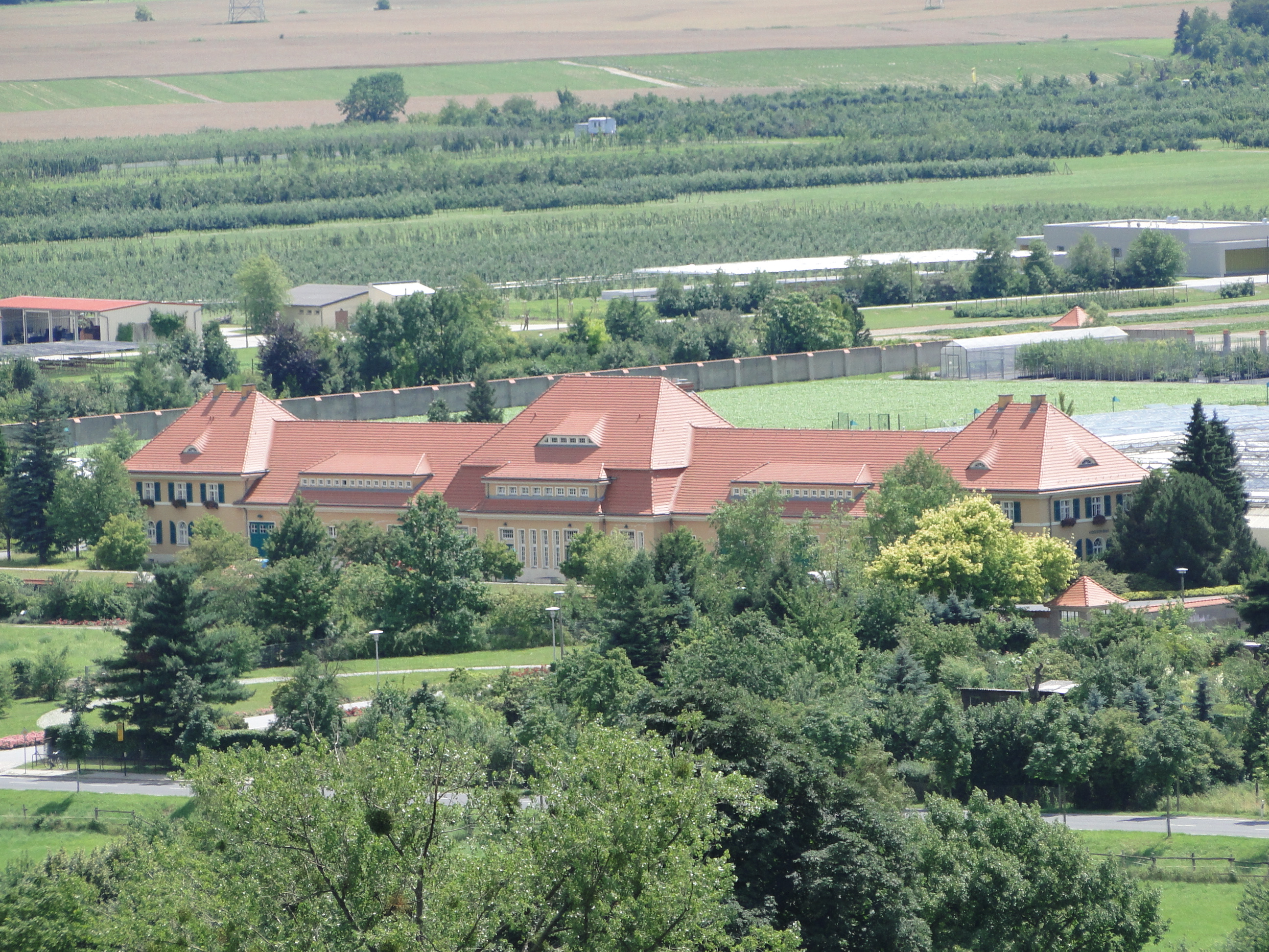 Lohmener Straße 10 Dresden